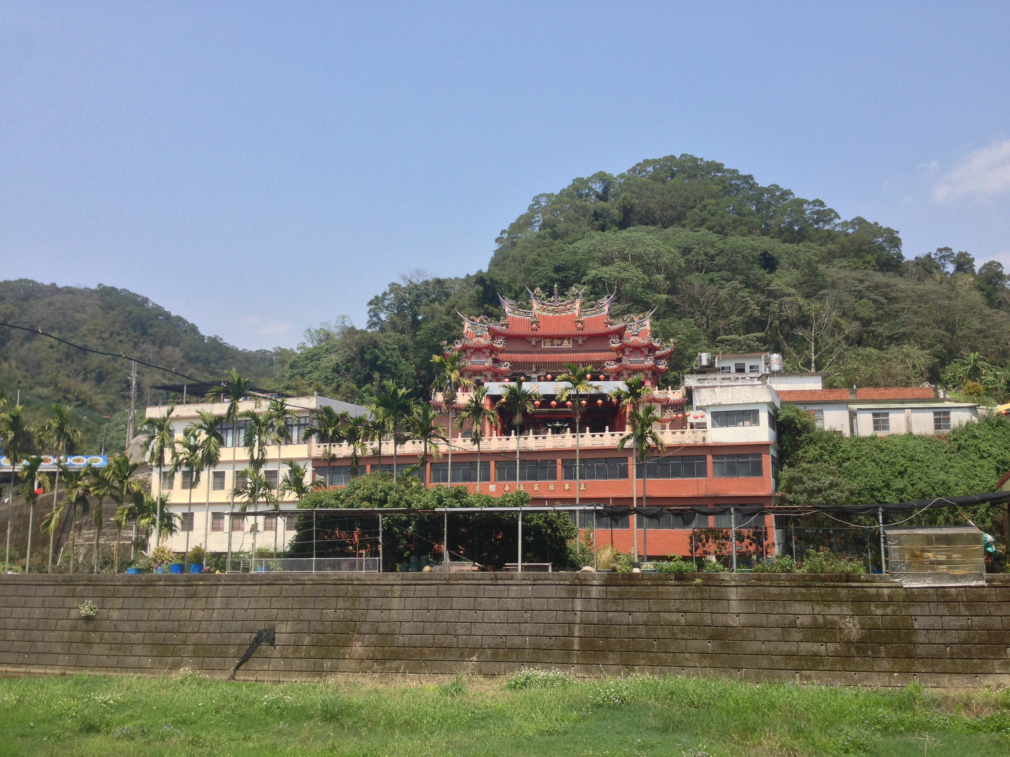 芎林鄉五龍村五和宮